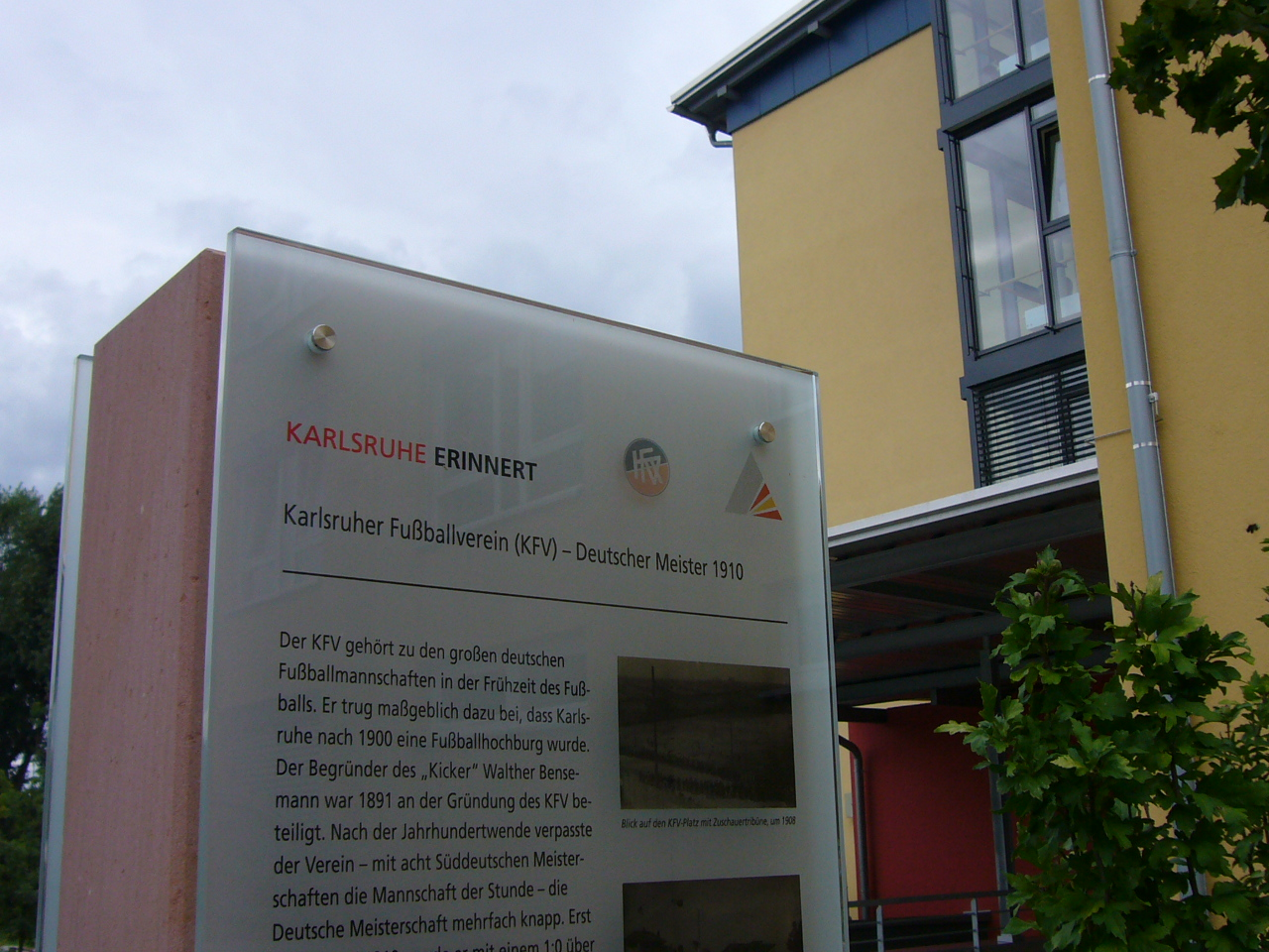 Infotafel in Karlsruhe am ehemaligen Standort des Vereinsheims des Karlsruher FV, dem Deutschen Fußballmeister 1910.